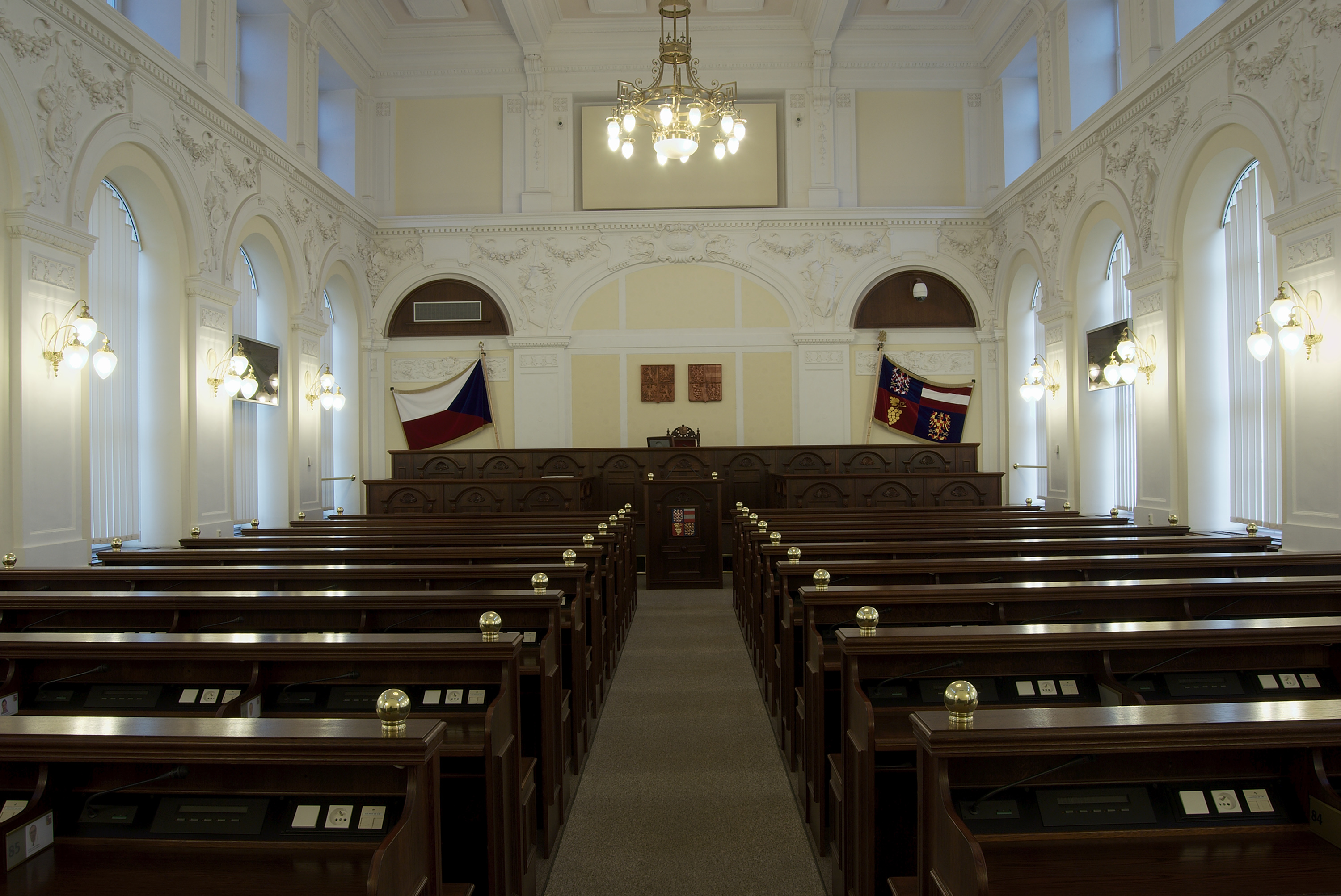 Nový zemský dům v Brně - sál zastupitelů Jihomoravského kraje